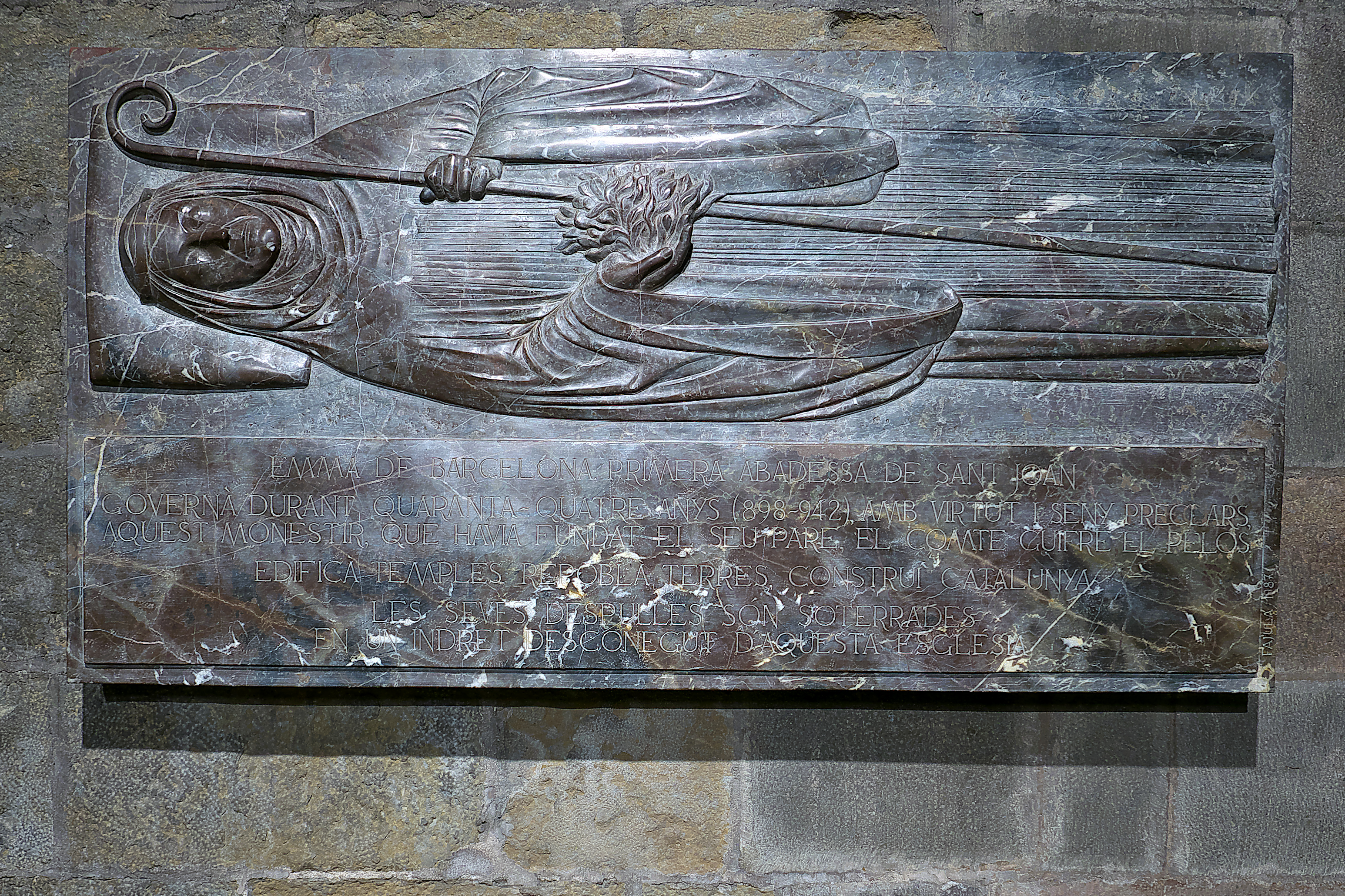 Emma de Barcelona (†949), primera abadesa del Monasterio de San Juan de las Abadesas.